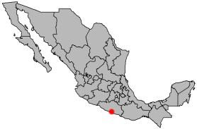 Locator map of Acapulco, Guerrero, Mexico